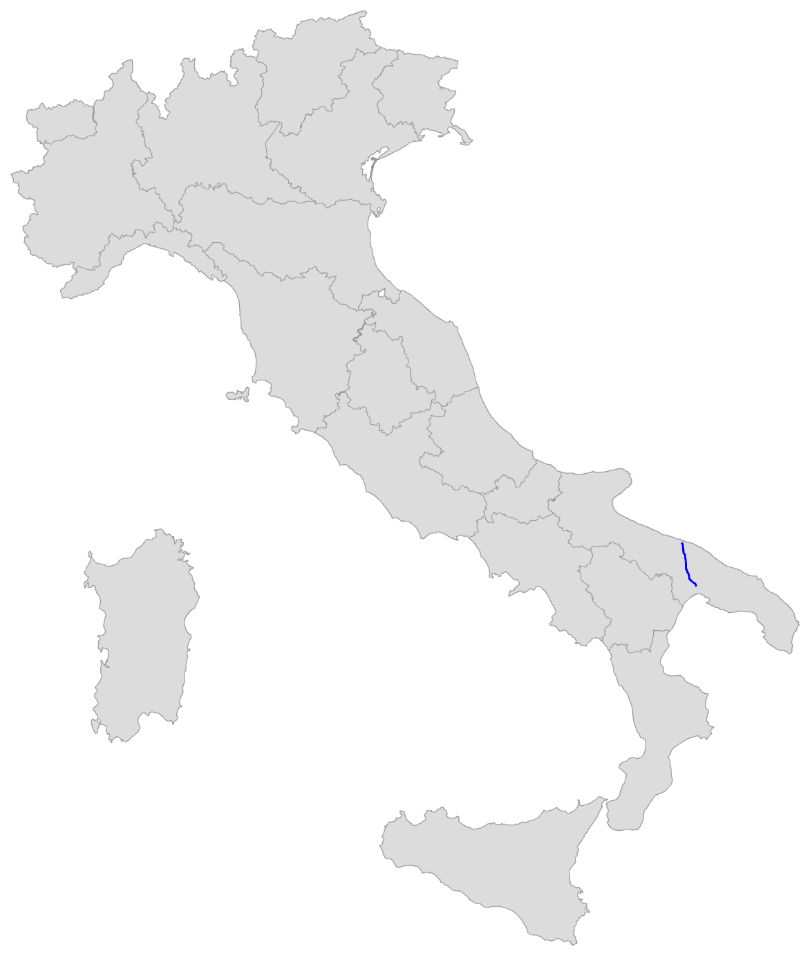 Percorso della SS 100 di Gioia del Colle